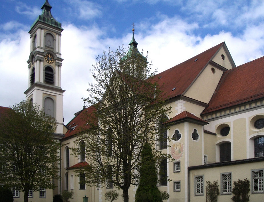 Ravensburg, Kloster Weißenau: Klosterkirche, vom Innenhof des Konventsgebäudes